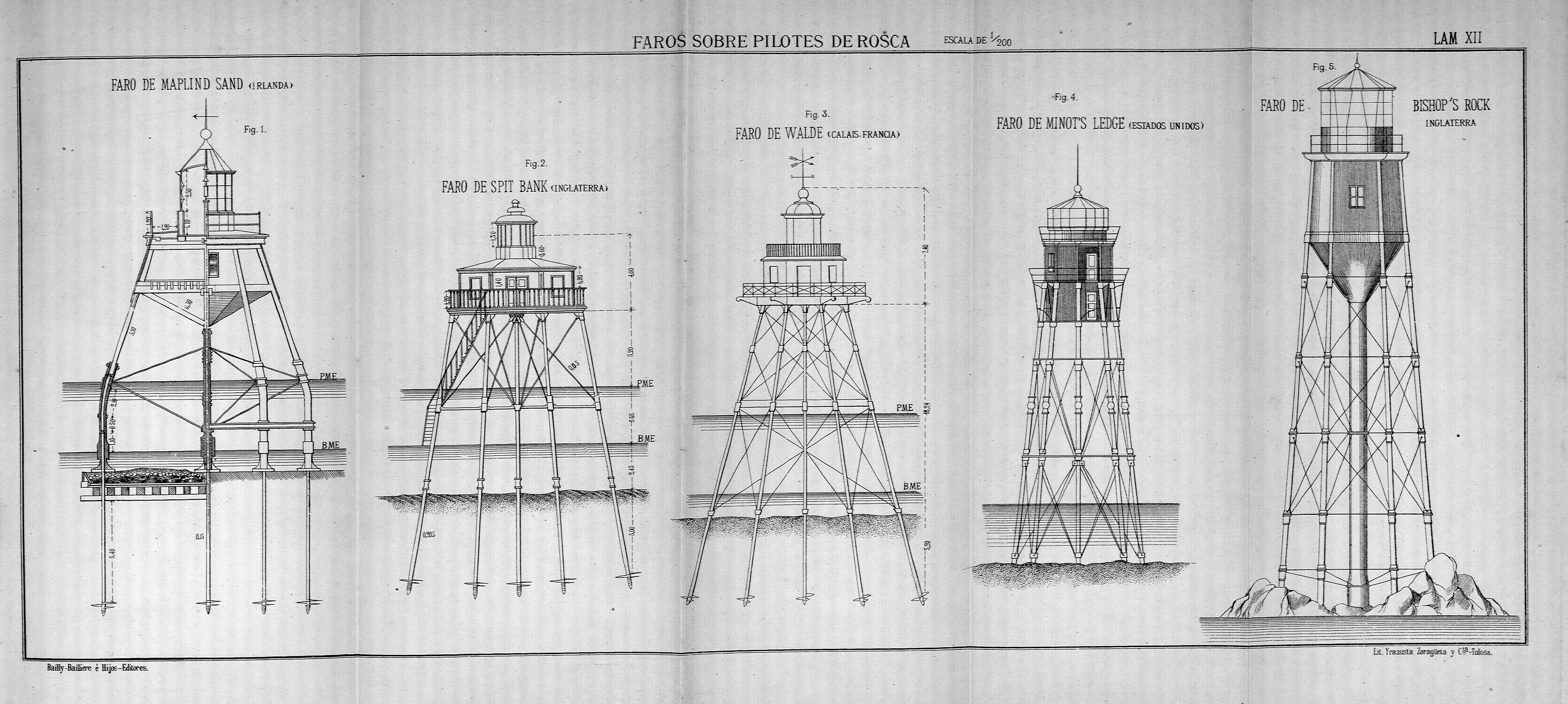 Lamina del libro Puentes de hierro económicos, muelles y faros sobre palizadas y pilotes mecánicos. Madrid: Librería Editorial de Bailly-Bailliere e Hijos.